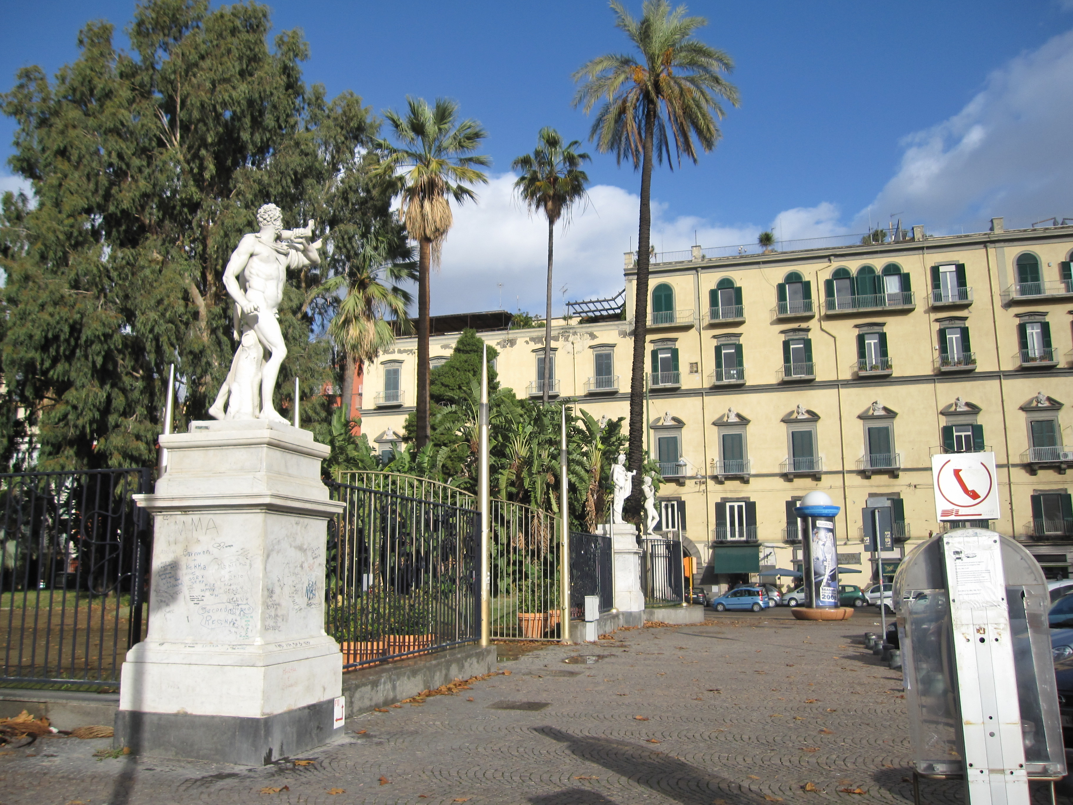 Ingresso alla Villa Comunale su Piazza Vittoria (Napoli)